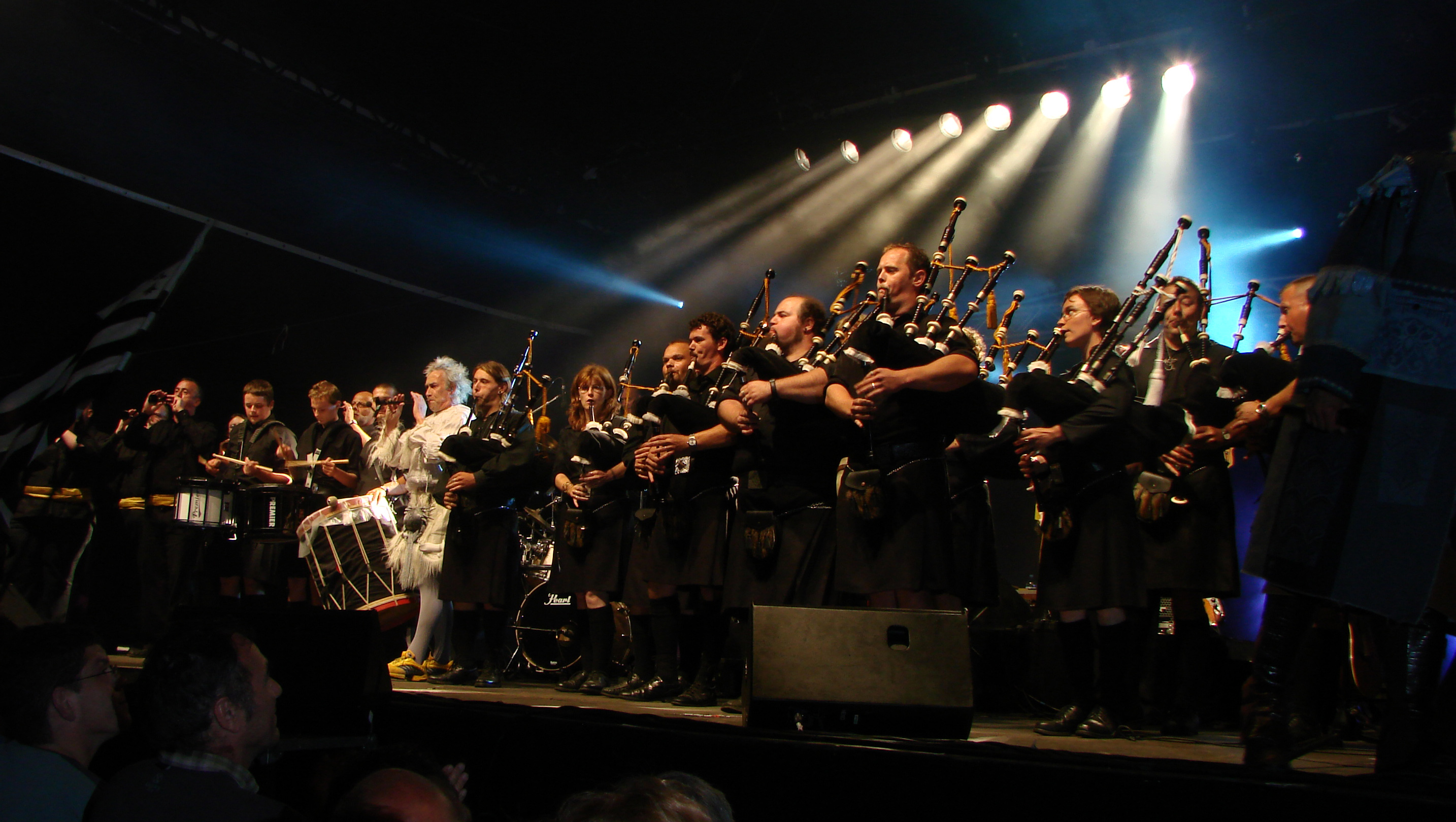 Le Bagad Arduinn sur scène avec Tri Yann, à l'Aymon Folk Festival, Bogny-sur-Meuse, le 4/08/2007.